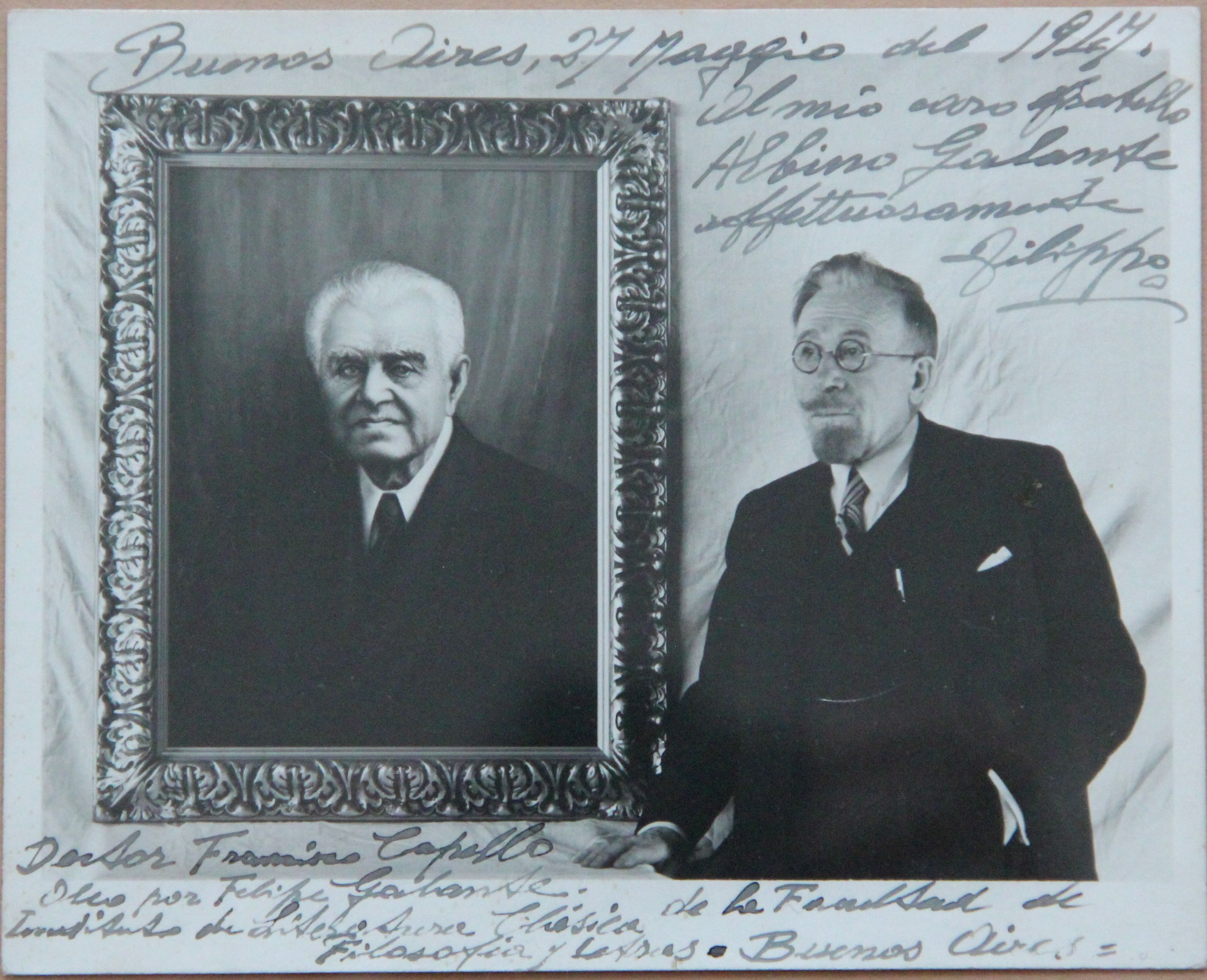 Francesco (poi naturalizzato Francisco) Capello (1859-1945), immigrato italiano in Argentina nel 1897, che fu per 34 anni docente di greco e latino nell'Instituto de Literatura Clasica de la Facultad de Filosofia y Letras di Buenos Aires. Ritratto eseguito ad olio da Filippo (poi naturalizzato Felipe) Galante (1872-1953). La cartolina fu inviata ad fratello Giuseppe Albino Galante e proviene dalla collezione Angelo Trusiani di Roma.